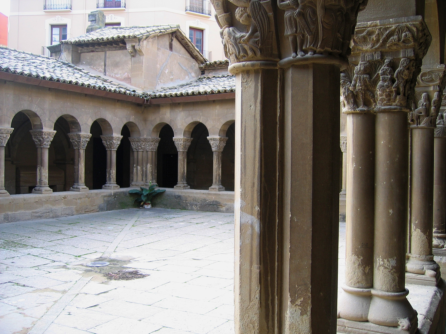 Claustro del Monasterio de San Pedro el Viejo, Huesca, Aragón, España